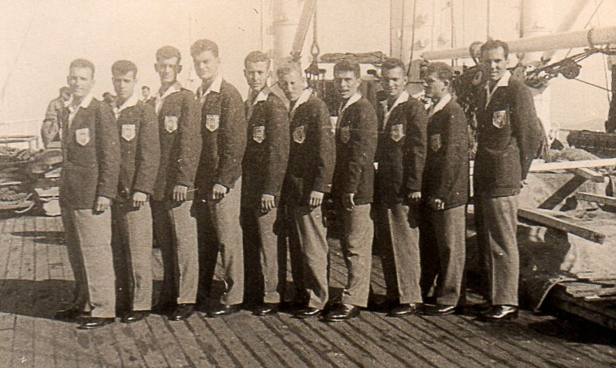 ישראל משתתפת לראשונה באולימפיאדת החרשים, עם נבחרת כדורסל, במילאנו איטליה 1957